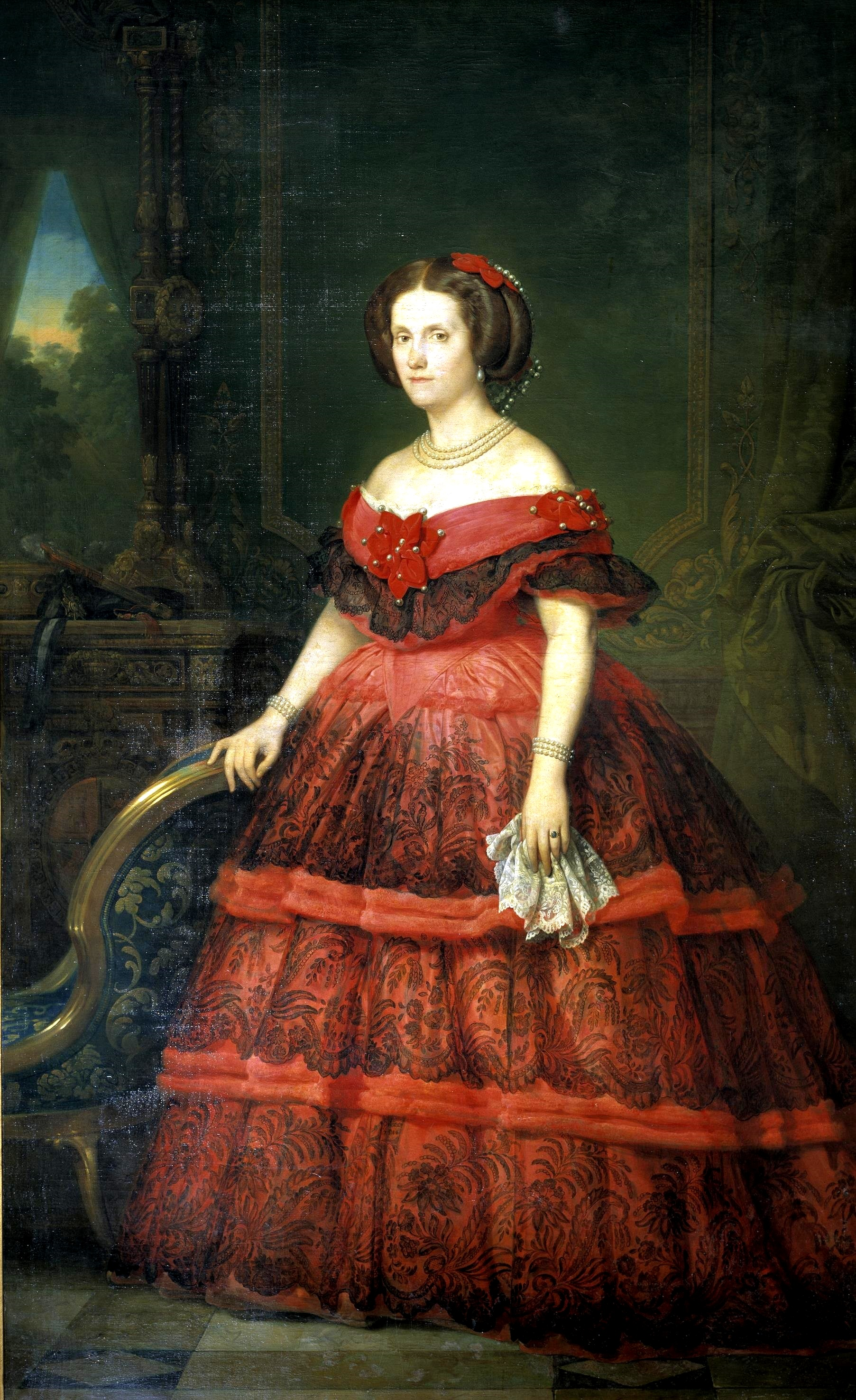 Retrato de Isabel Fernanda de Borbón (1821-1897), que fue hija del infante Francisco de Paula de Borbón y nieta del rey Carlos IV de España.